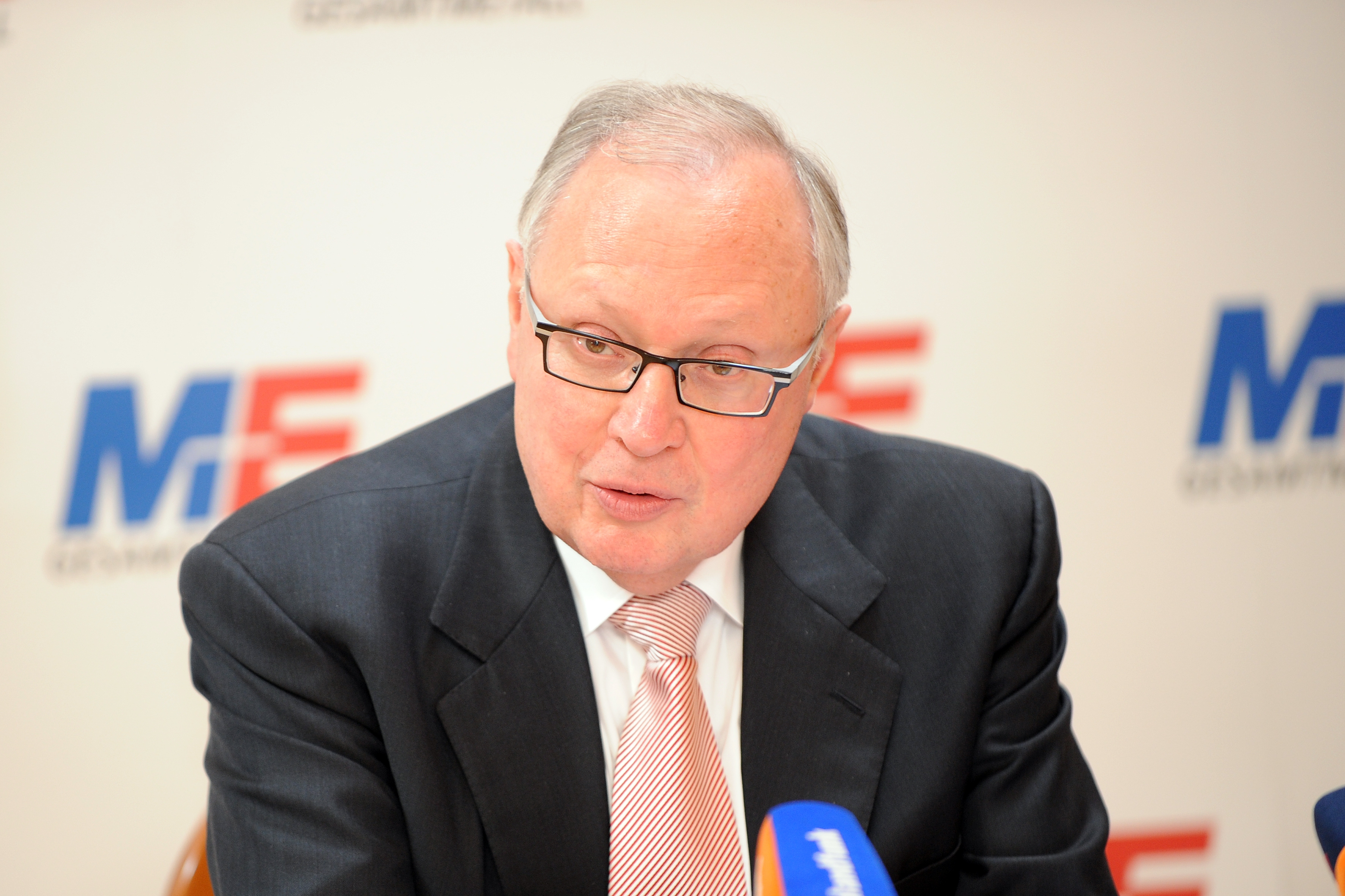 Gesamtmetall-Präsident Martin Kannegiesser